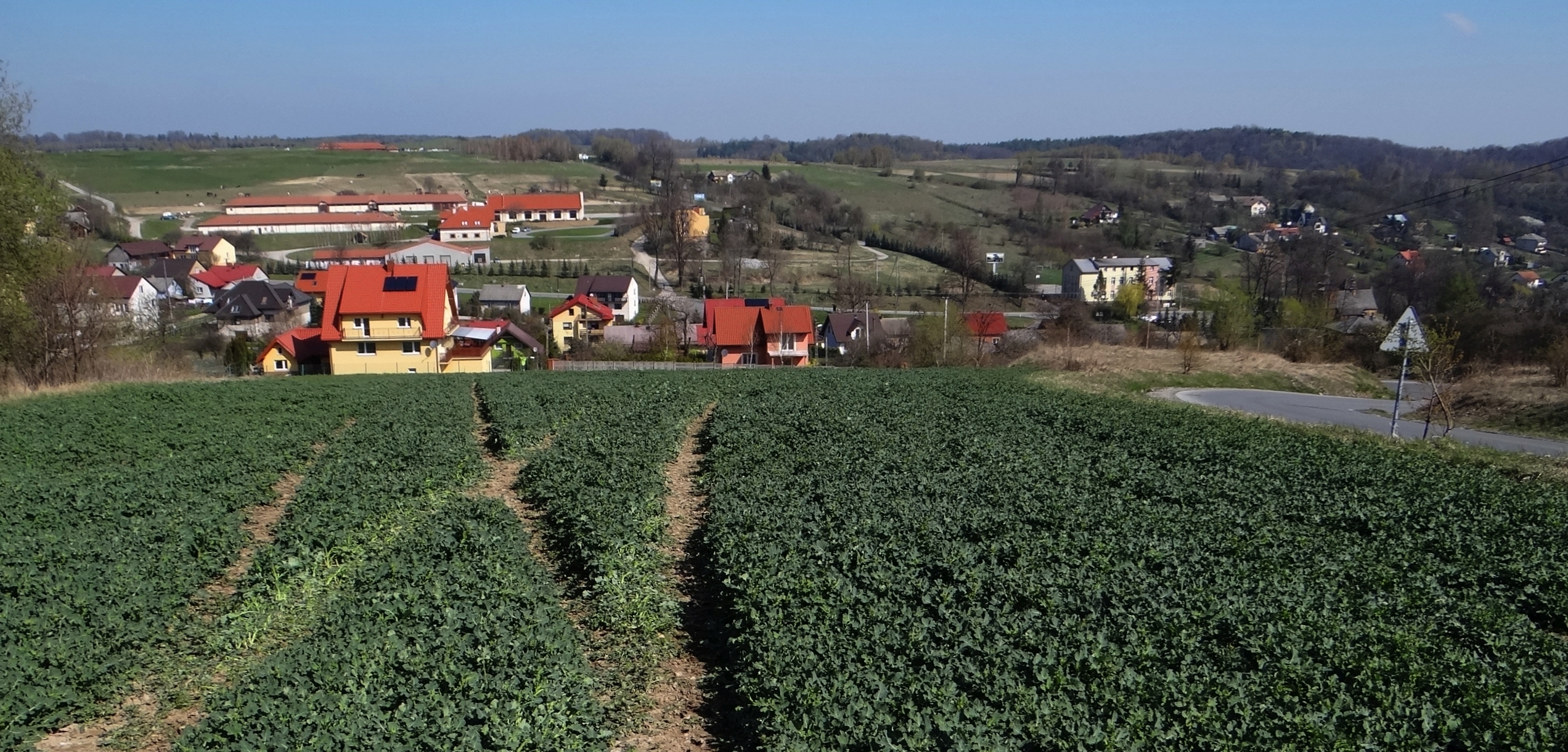 Paczółtowice